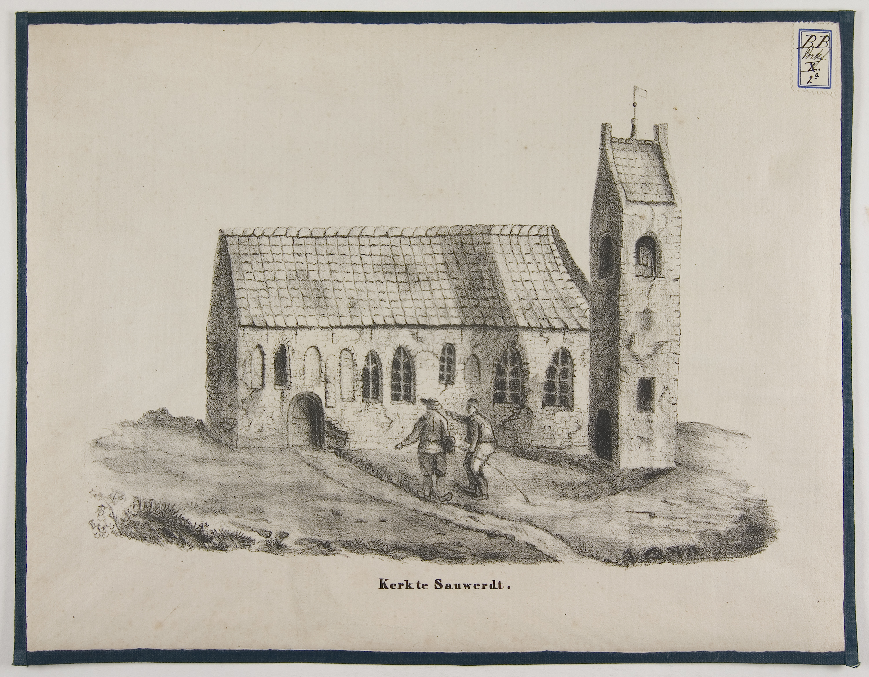 Oude kerk van Sauwerd, gesloopt in 1840.